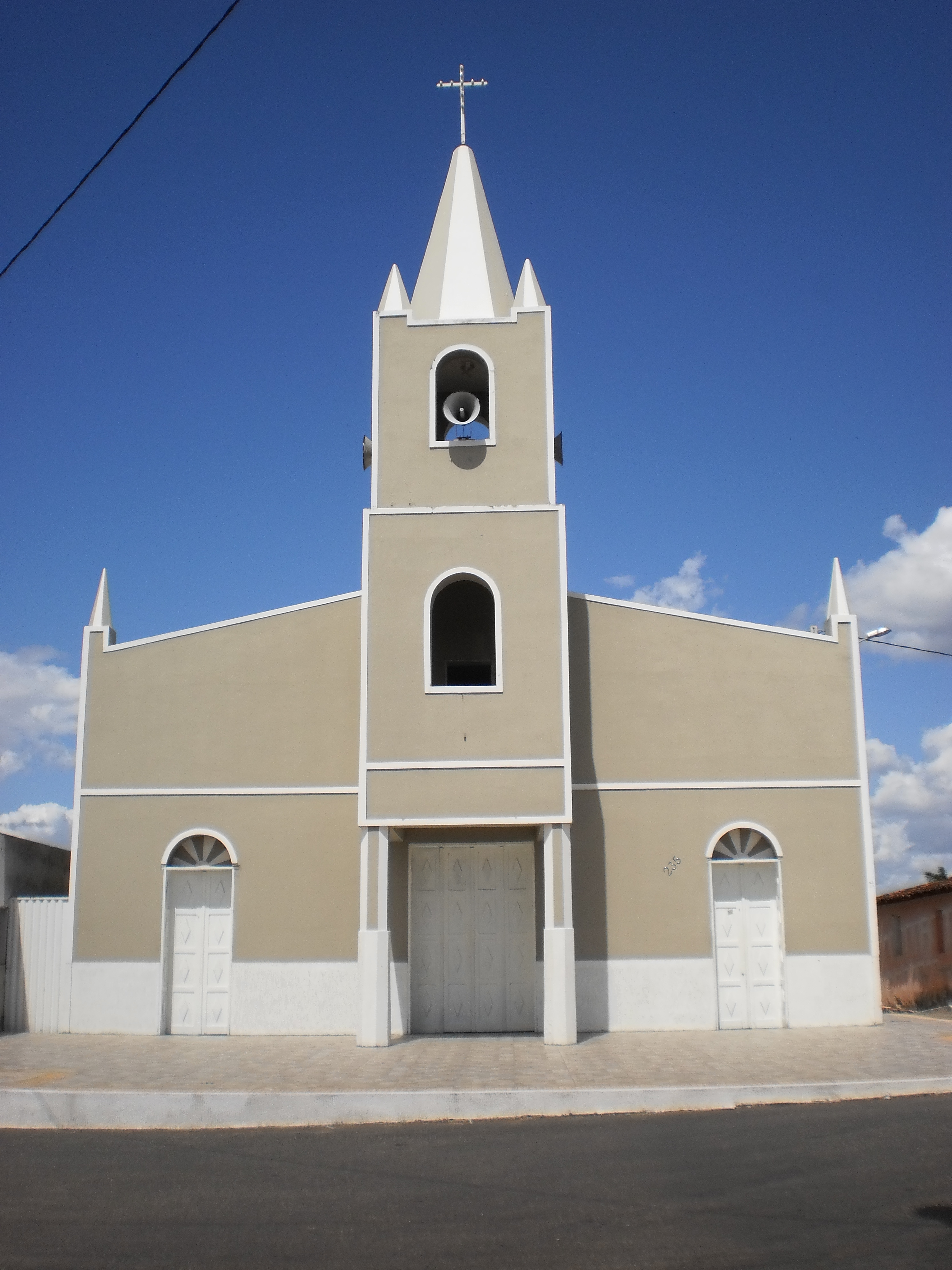 Capela do Sagrado Coração de Jesus, pertencente à Paróquia Nossa Senhora da Conceição de Portalegre, em Riacho da Cruz, Rio Grande do Norte, Brasil.